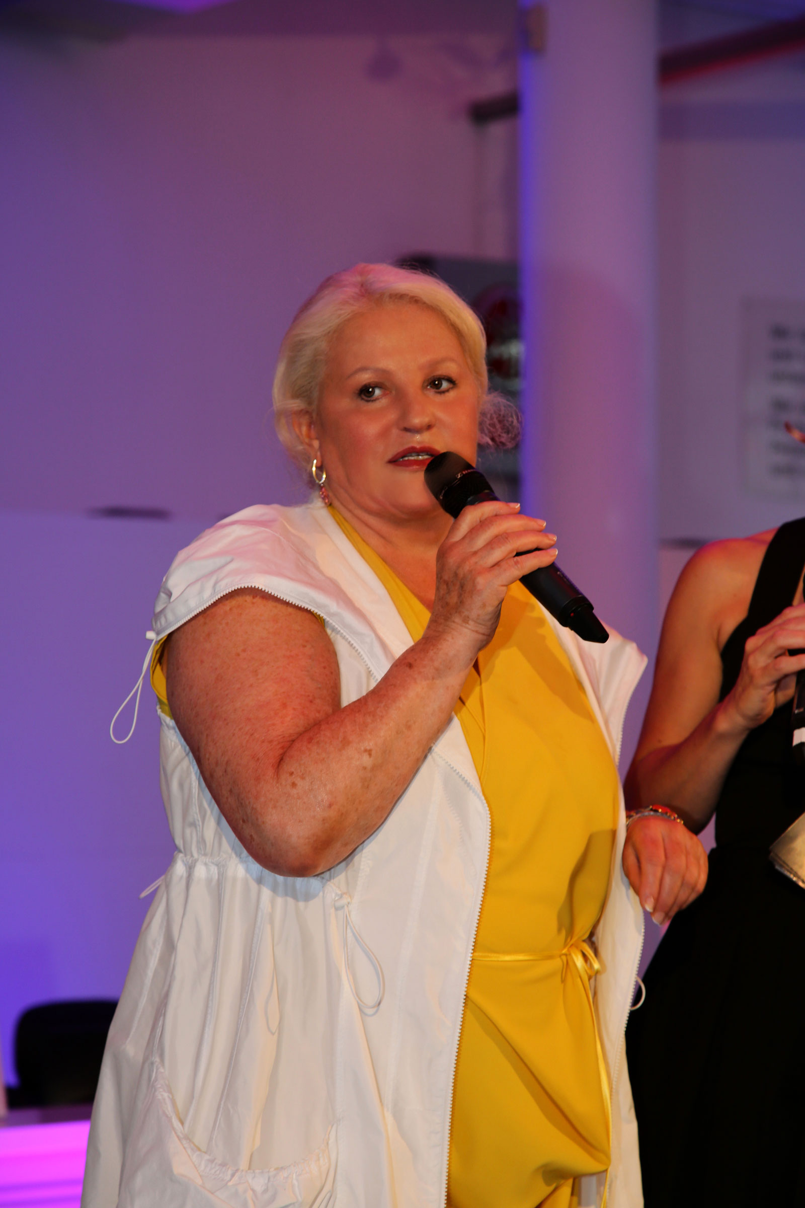 Lichter_Marika-7310-fmp